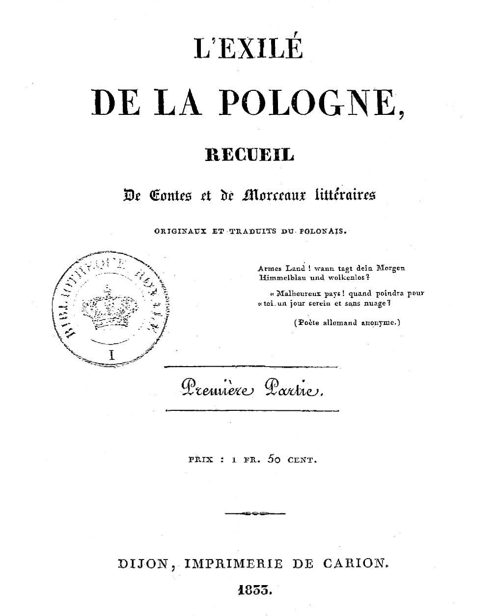 L'Exilé de la Pologne. Recueil de contes et de morceaux littéraires originaux, et traduits du polonais... Éditeur : imp. de Carvin (Dijon)